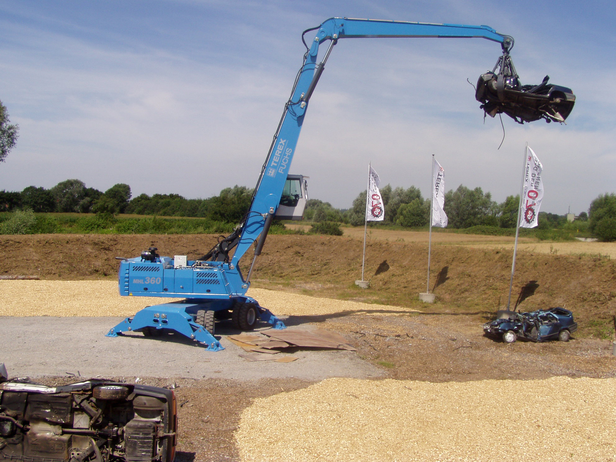 Terex/Fuchs MHL 360 Lademaschine bei einer Vorführung beim 50jährigen Werksjubiläum am 14.Juli 2007.